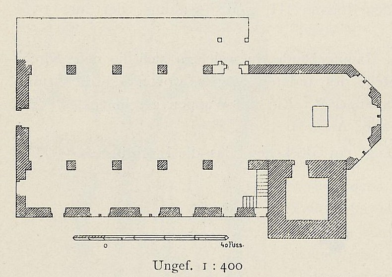 Johanniterturm Nidda, Wetteraukreis, Hessen, Deutschland